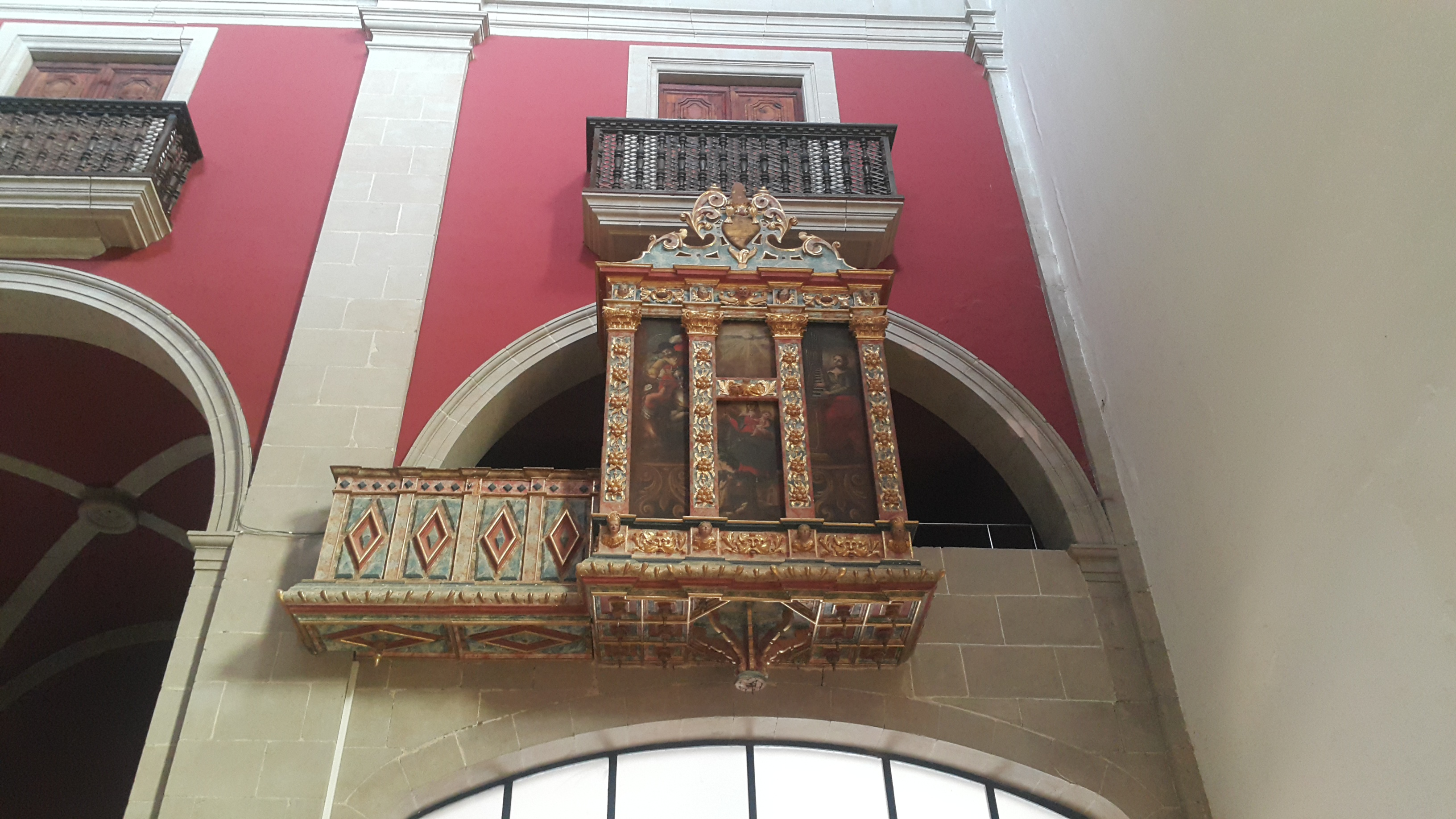 Orgue barroc del Monestir del Miracle de Riner